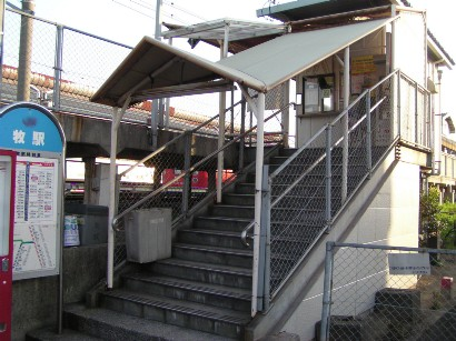 2005年3月31日に投稿者が大分県はja:牧駅 (大分県)にて撮影いたしました。